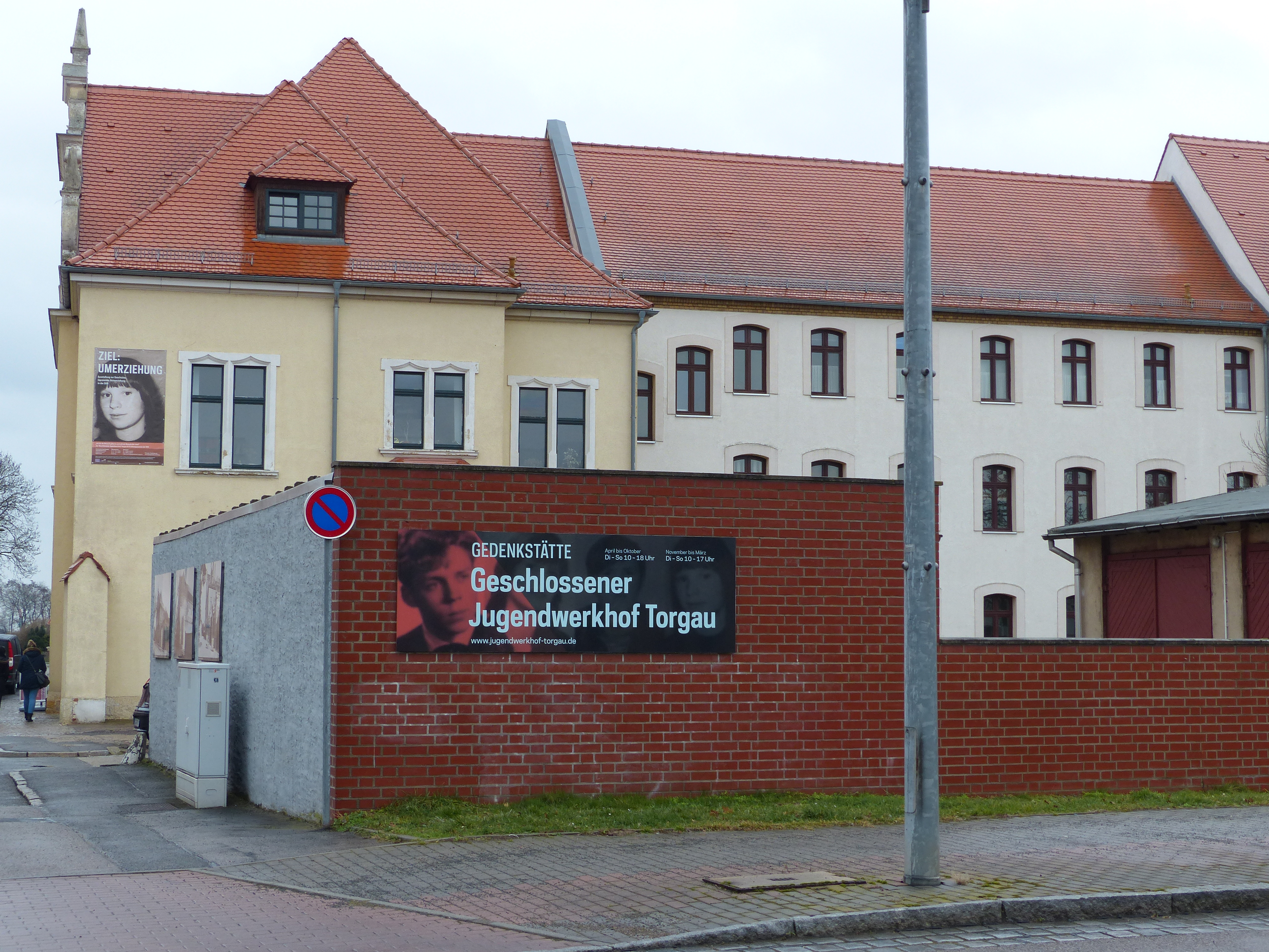 Außenansicht der Gedenkstätte Geschlossener Jugendwerkhof Torgau